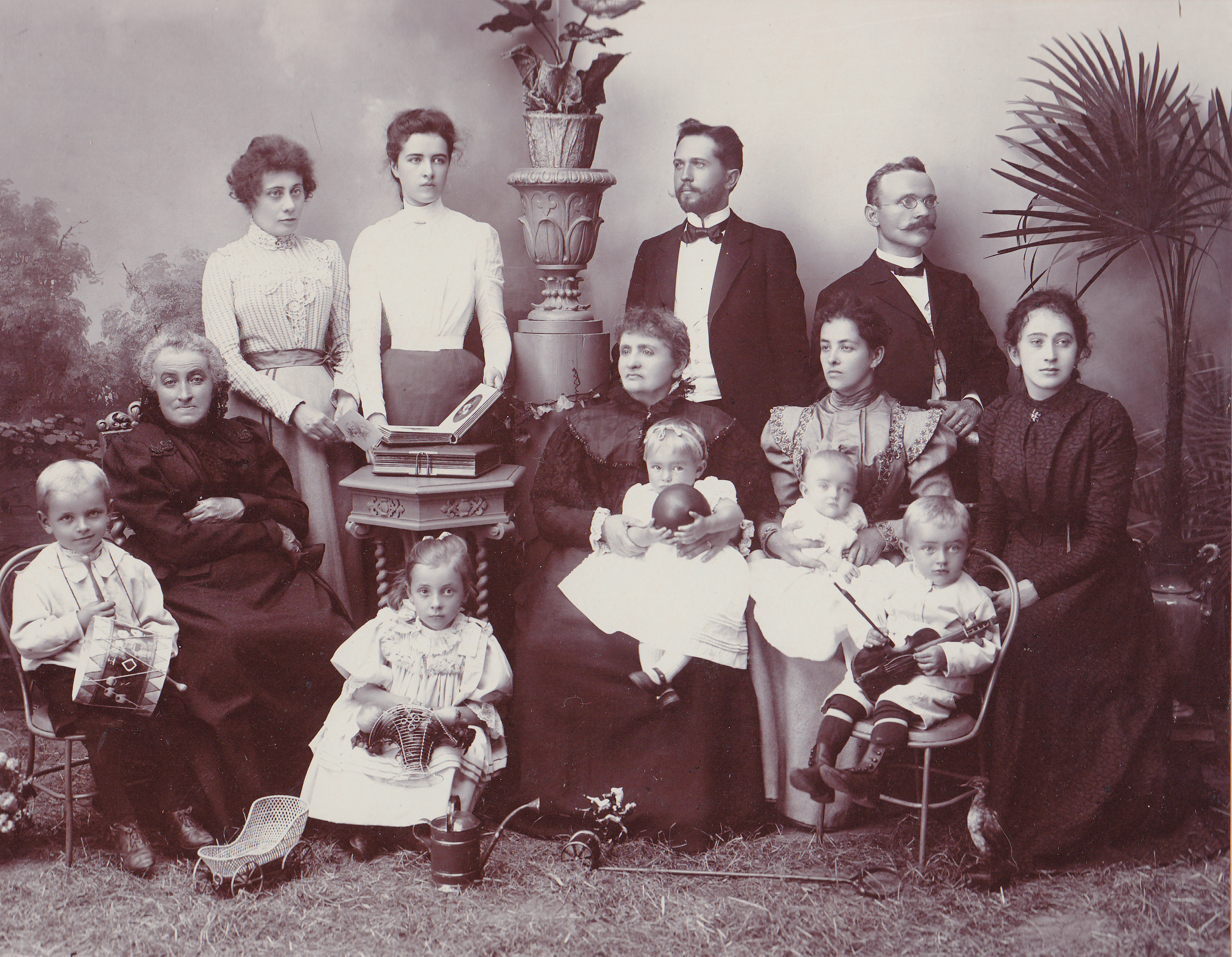 Kazimierz Sadłowski w otoczeniu rodziny. Zdjęcie pochodzi z roku 1906